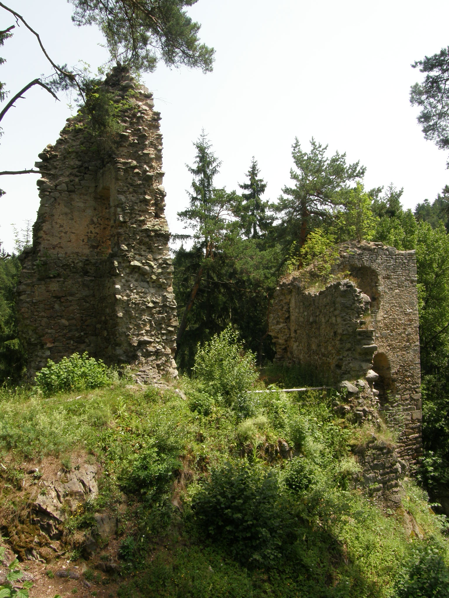 Česky: Zřícenina hradu Louzek